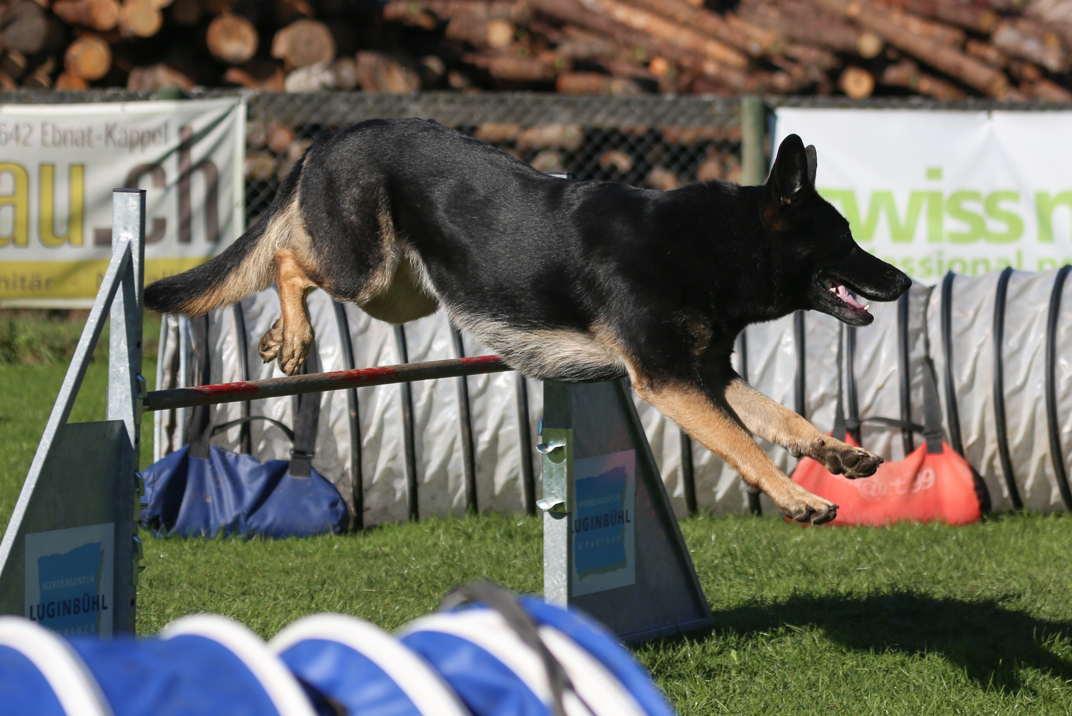 Agility-Wettkampf in der Ostschweiz – Deutscher Schäfer beim Sprung